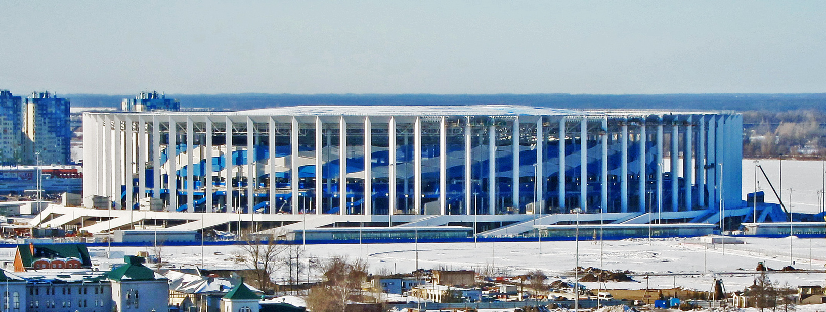 Стадион Нижний Новгород